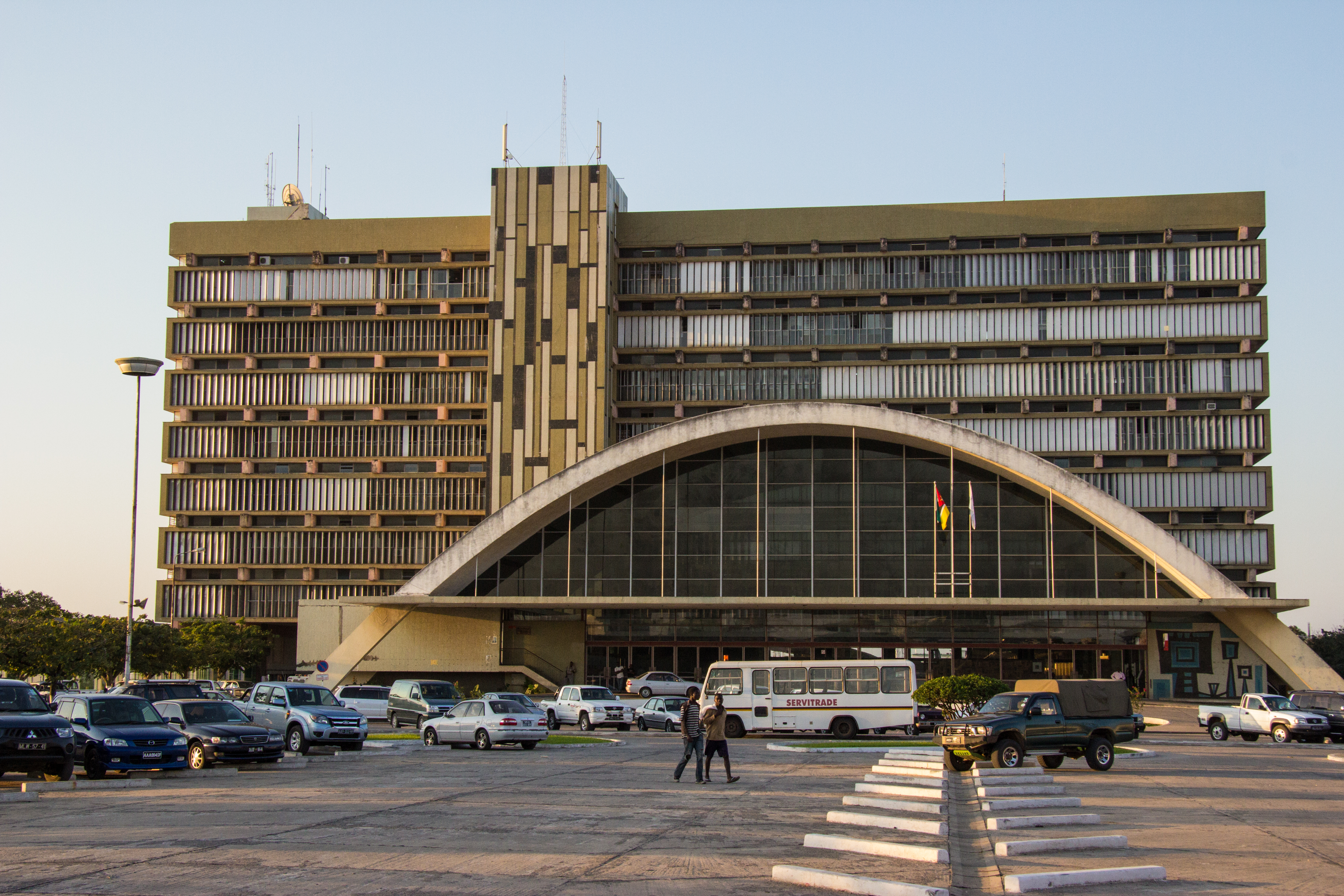 Beautiful 1960's building